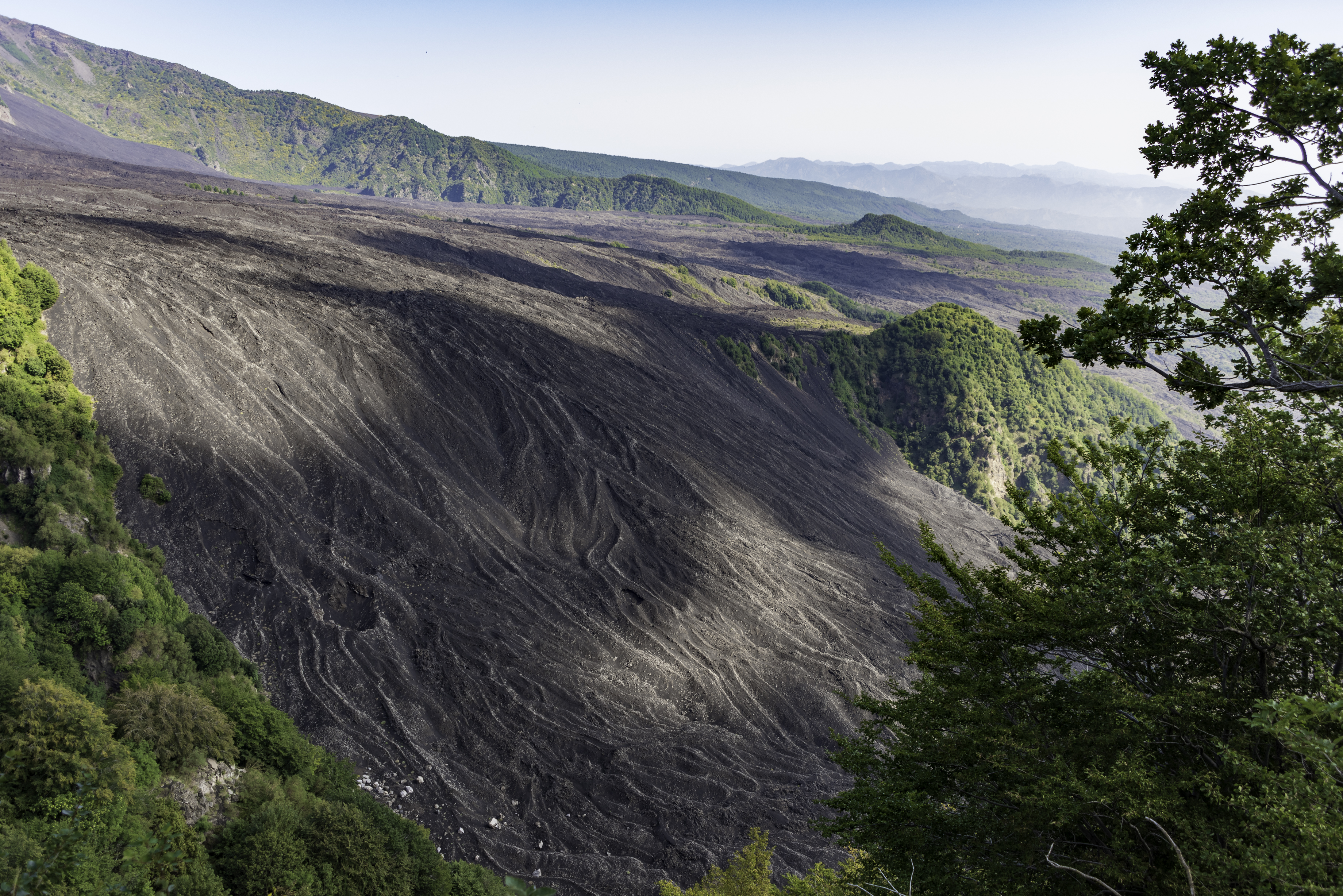 Übergang von der oberen zur unteren Ebene